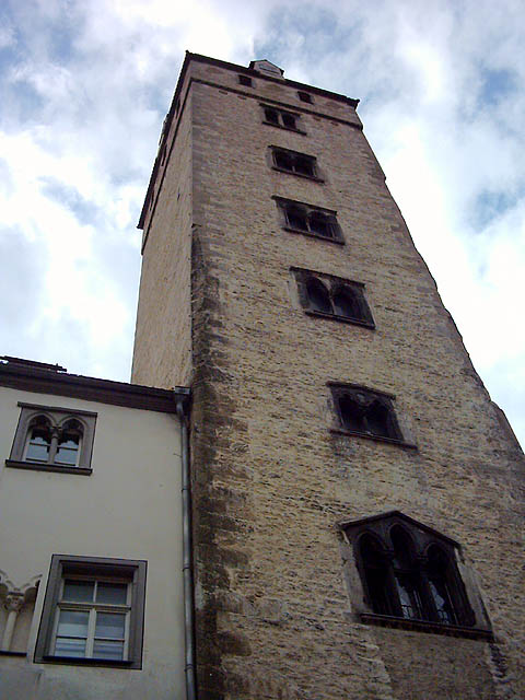 Regensburg (Bayern): Der 1260 entstandene Goldene Turm in der Wahlenstraße. Er ist wohl der bekannteste der Regensburger Geschlechtertürme nach italienischem Muster, mit denen die Patrizierfamilien ihren Reichturm und Einfluss zur Schau stellten. Heute dürfen Studenten dort wohnen. Nicht zuletzt wegen dieser das Stadtbild prägenden Türme bezeichnet man Regensburg gelegentlich als "nördlichste Stadt Italiens", während es für Johann Wolfgang Goethe die "deutscheste aller Städte" war...